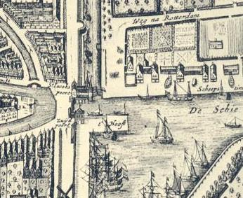 haven Hooft (locatie Schiedamse Poort)